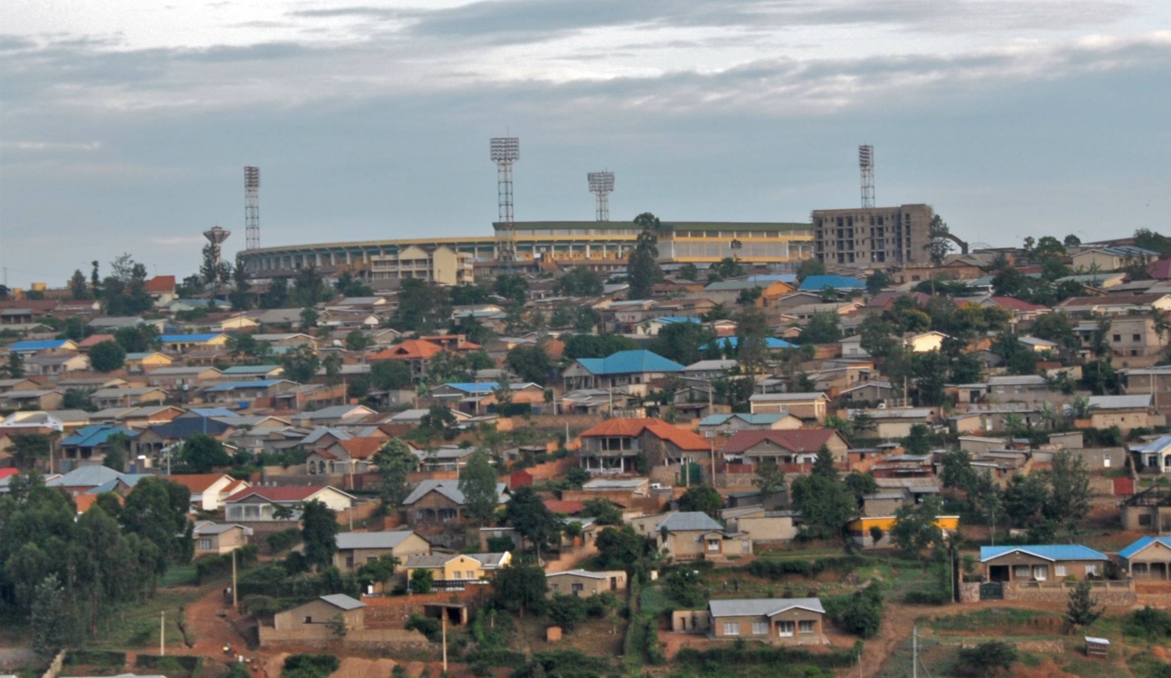 Main stadium Kigali